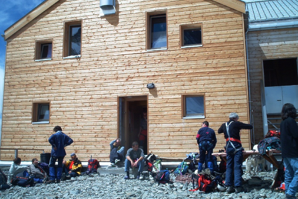 Foto di Sauro Agostini, nuovo rifugio Marco e Rosa nel gruppo del Bernina. Immagine di pubblico dominio.